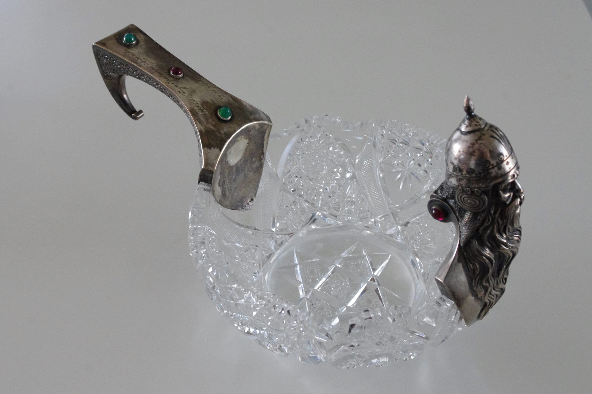 Kunniapalkinto 1925